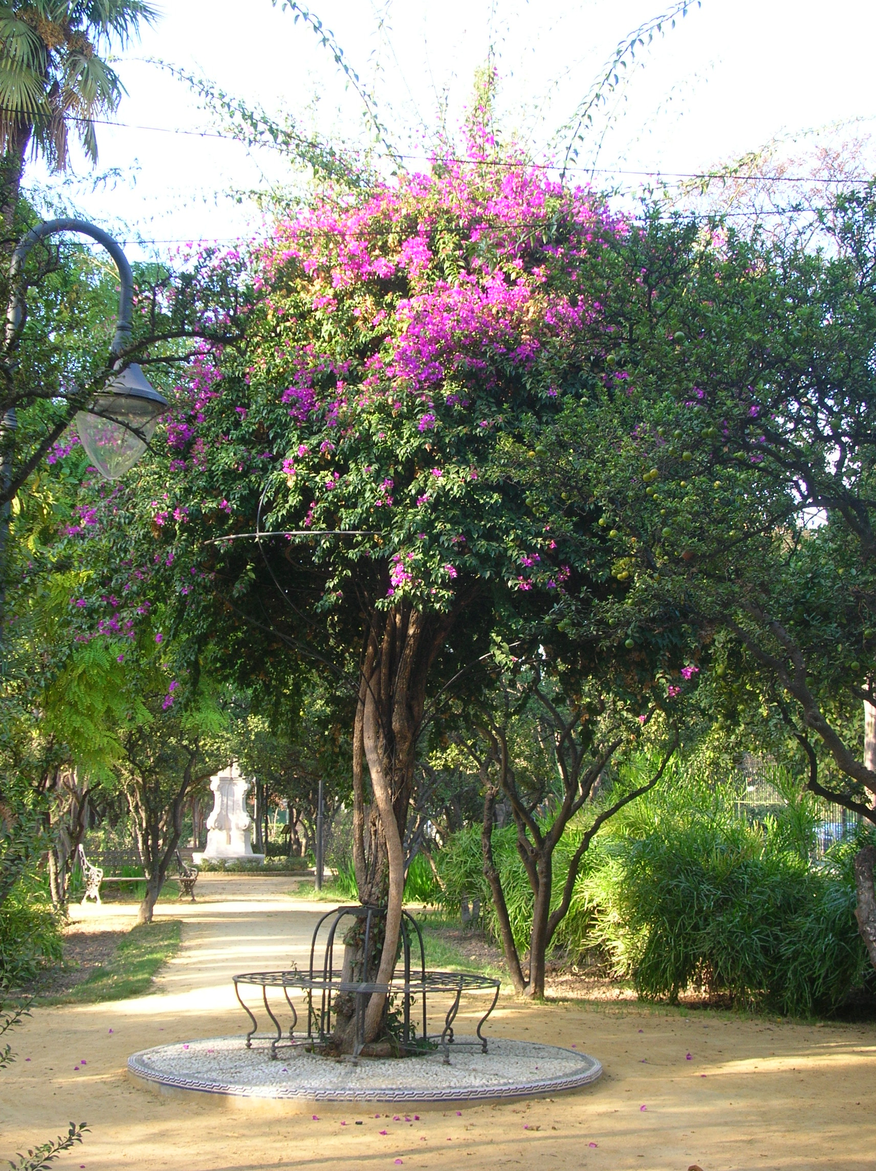 Jardins de las Delicias, Séville (Espagne)